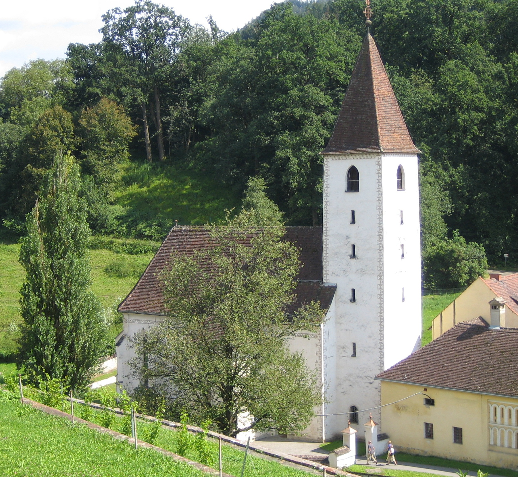 Filialkirche Hl. Erhardt, St. Paul im Lavanttal